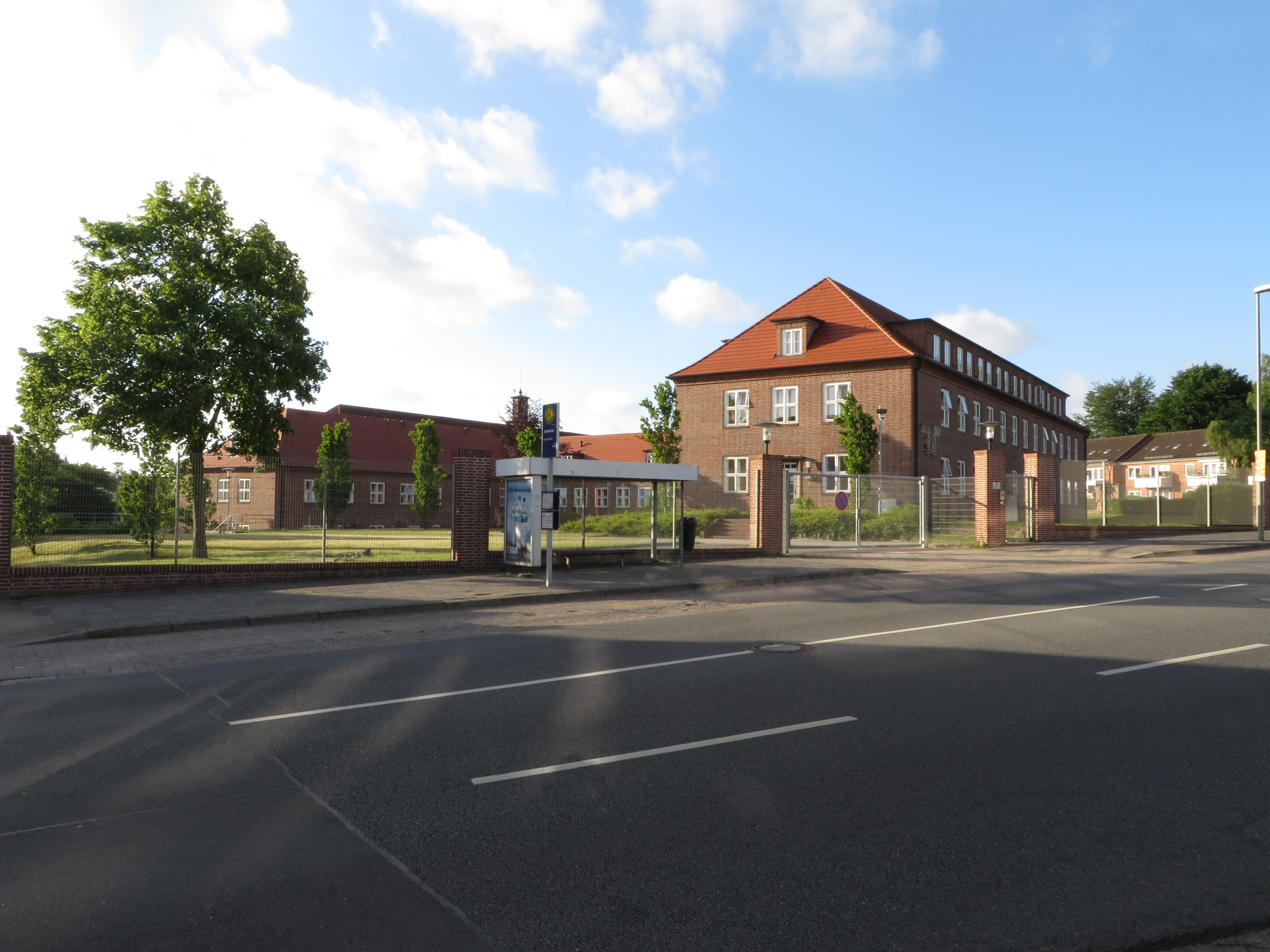 Die Sportschule Flensburg-Mürwik (Mai 2014), Bild 005